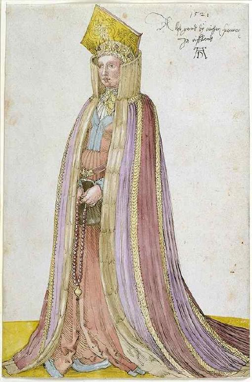 aquarelles d'Albrecht Dürer,Femmes de Livonies